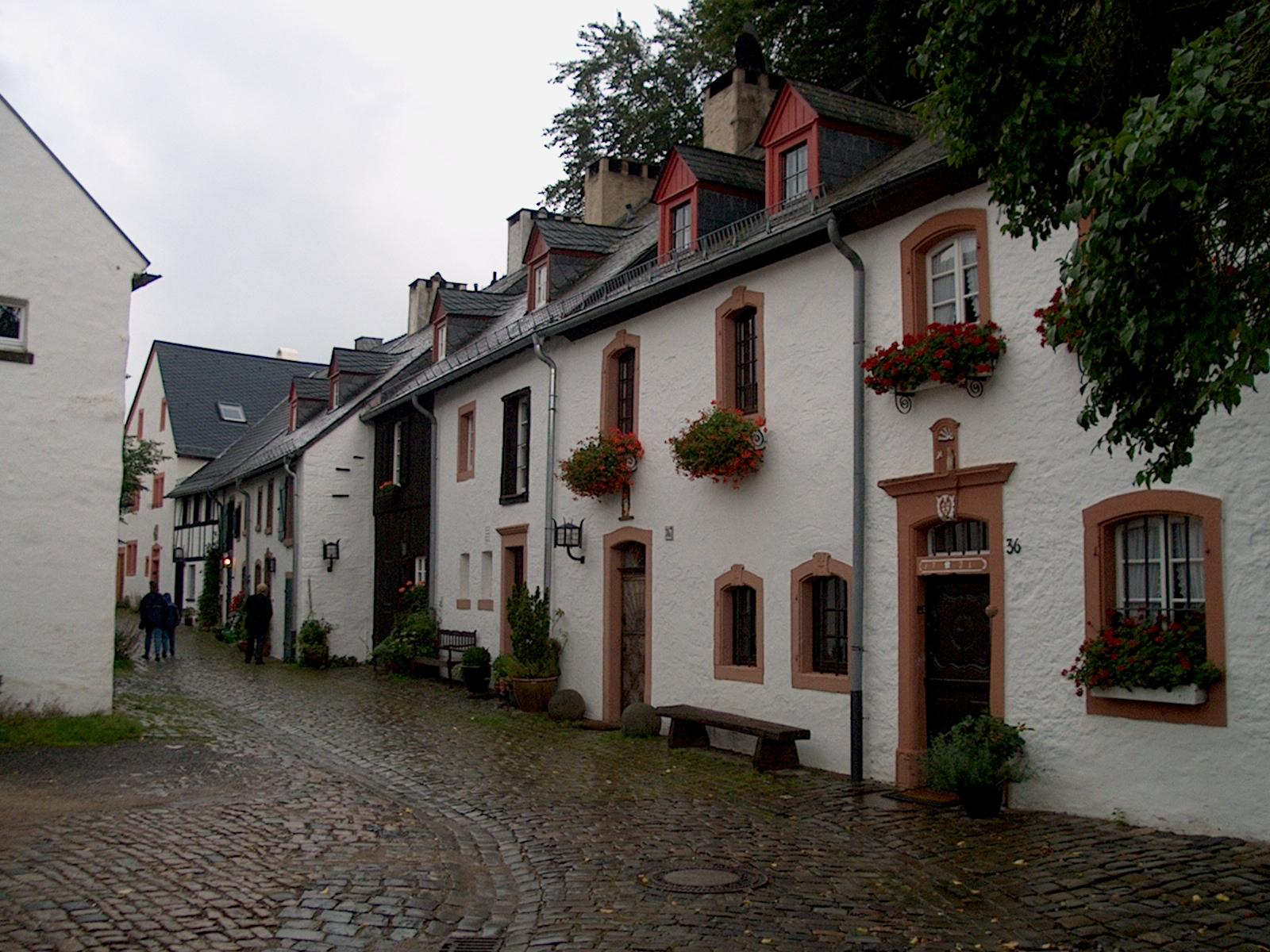 Ortsansicht Kronenburg, Kreis Euskirchen This image shows a heritage building in Germany, located in the North Rhine-Westphalian city Dahlem (Nordeifel) (no. 4). This image shows a heritage building in Germany, located in the North Rhine-Westphalian city Dahlem (Nordeifel) (no. 5).